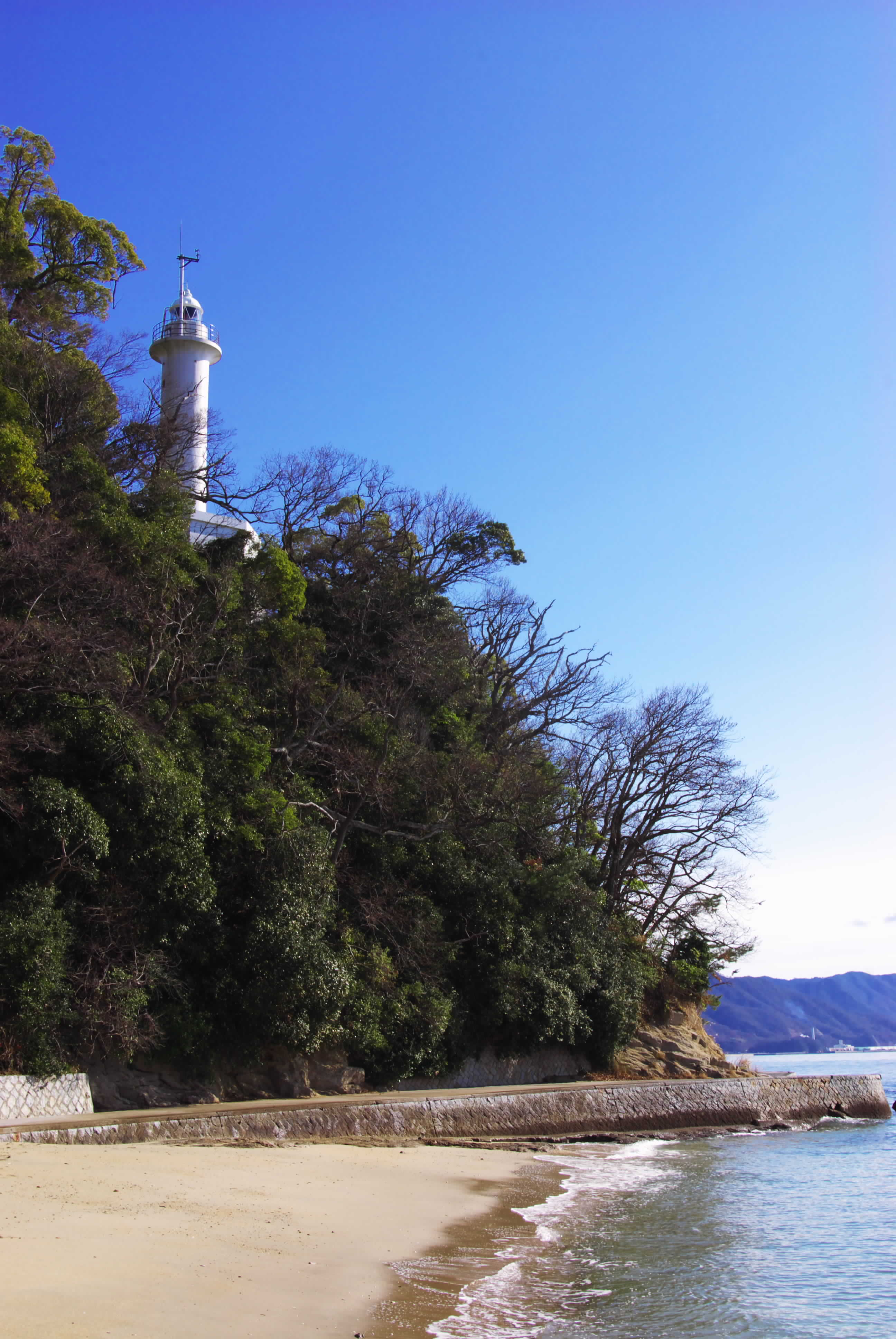 Ujina Park promenade